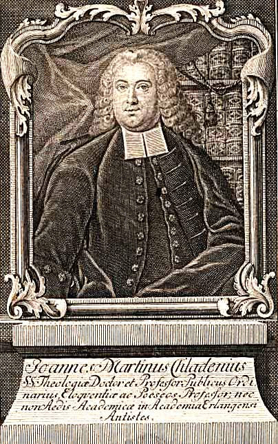 Johann Martin Chladni (1710-1759), evangelischer Theologe und Historiker